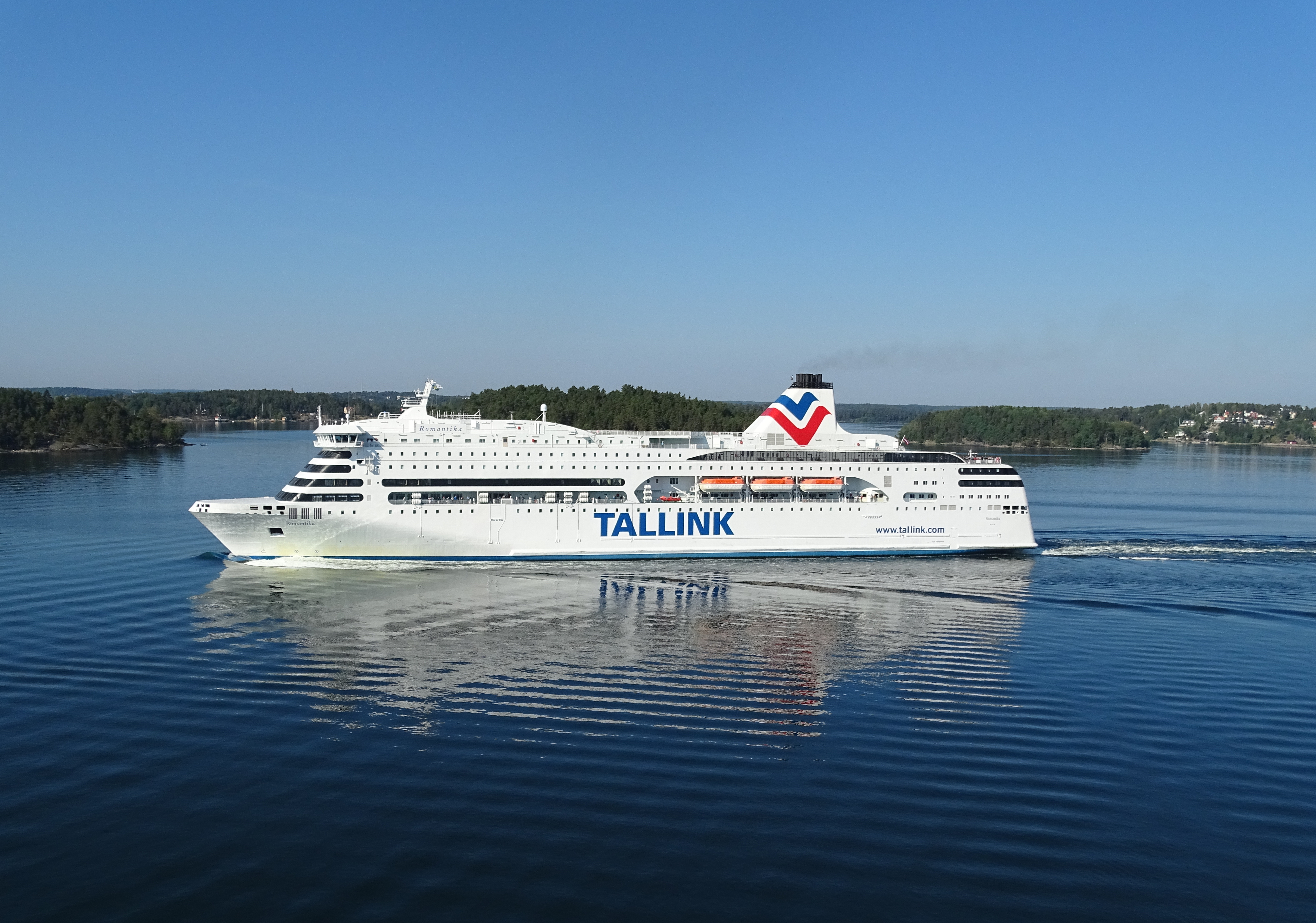 De cruiseferry Tallink MS Romantika.